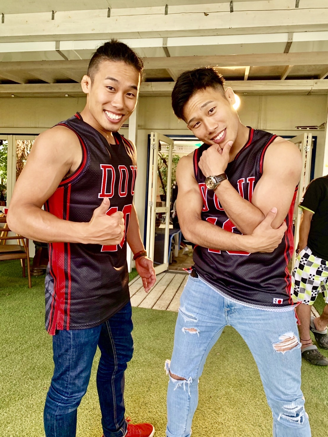 アーティスト写真